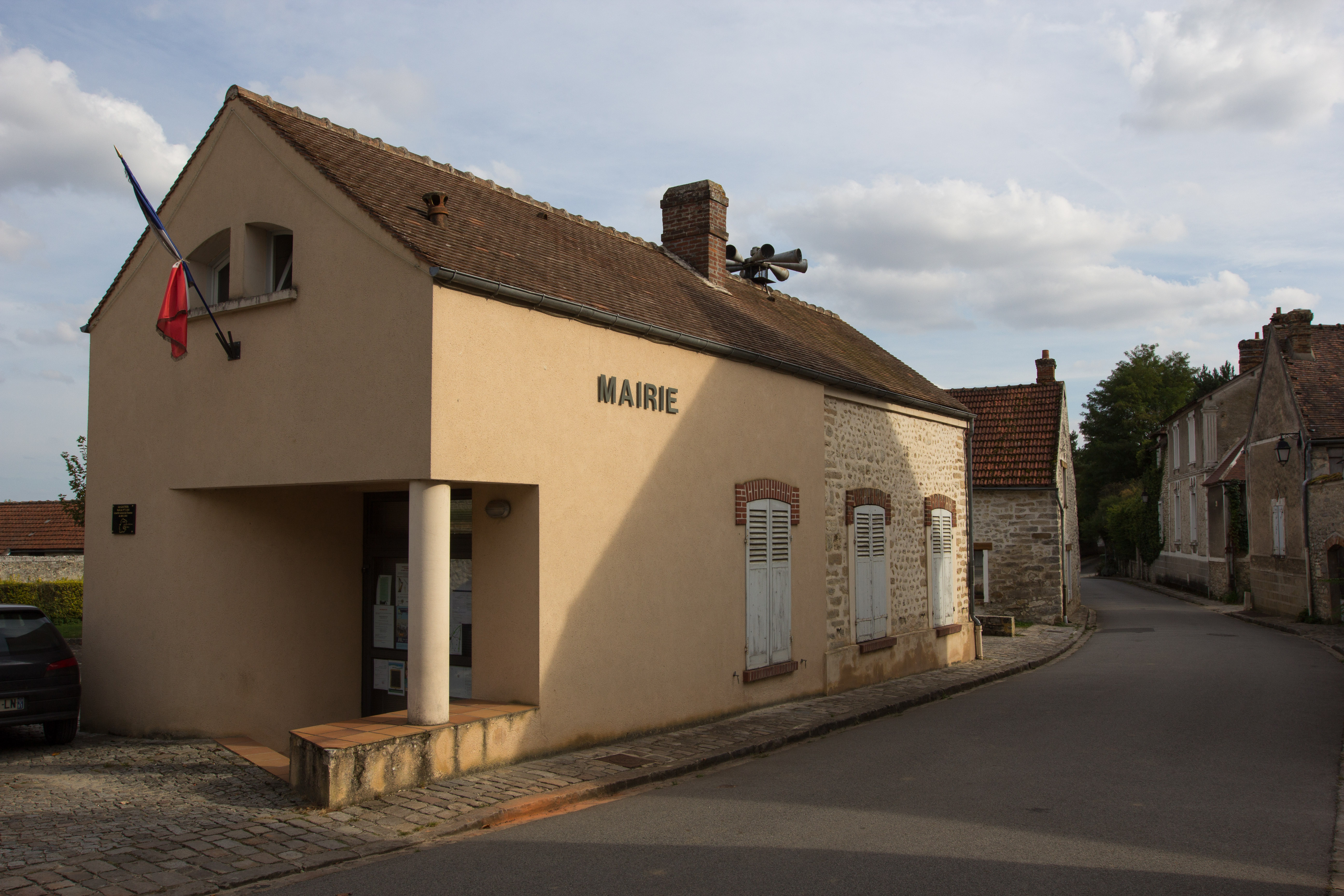 Mairie d'Orveau / Orveau / Essonne / France